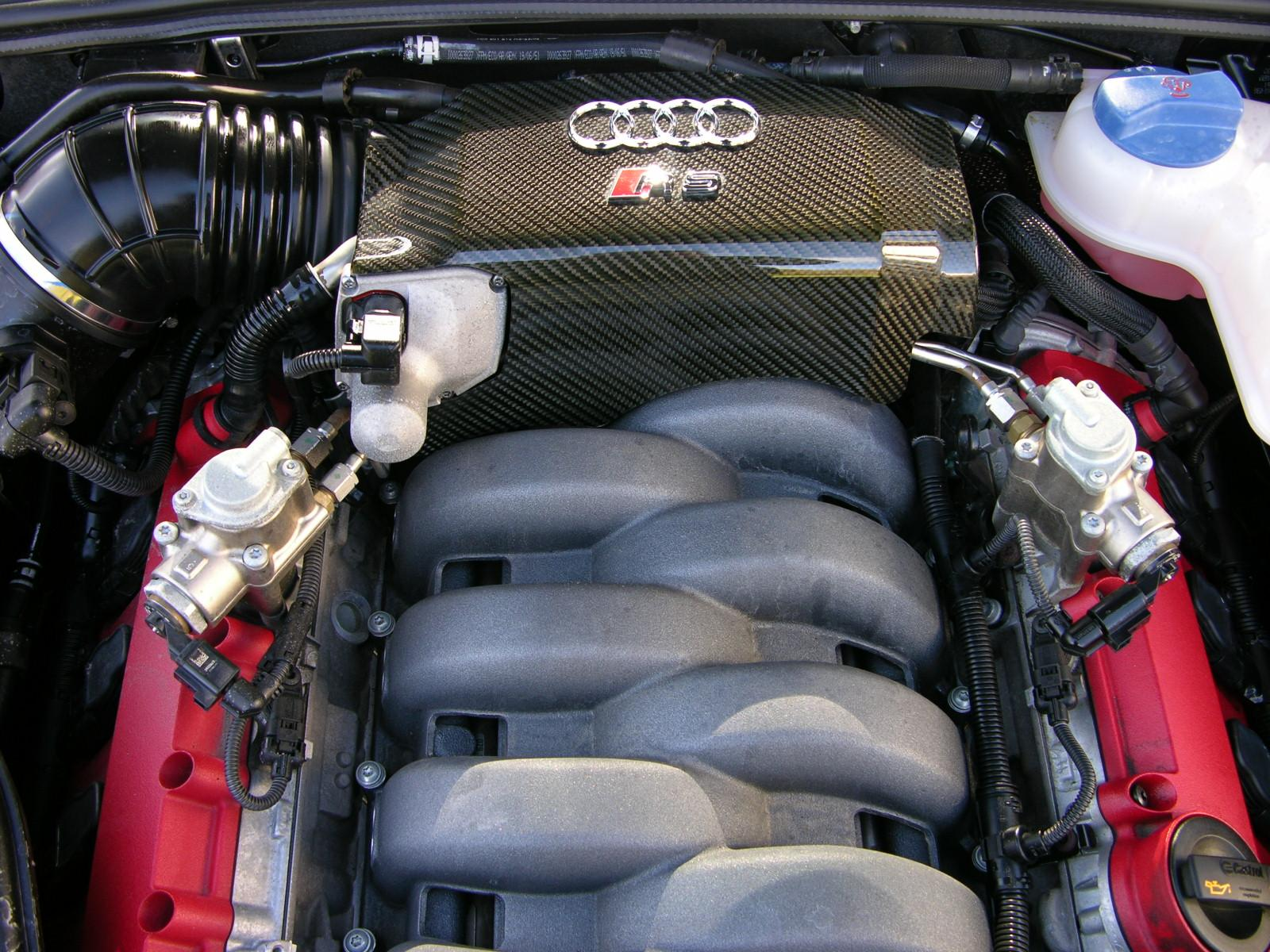 Moteur de l'Audi RS4 B7